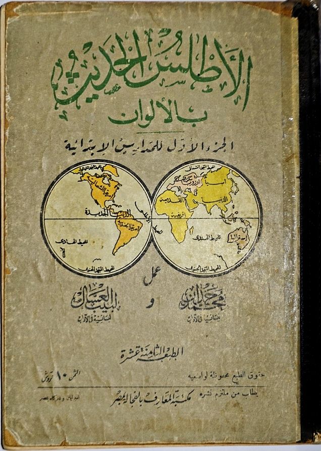 .الأطلس الحديث بالألوان للمدارس الإبتدائية، الطبعة الثامنة عشر